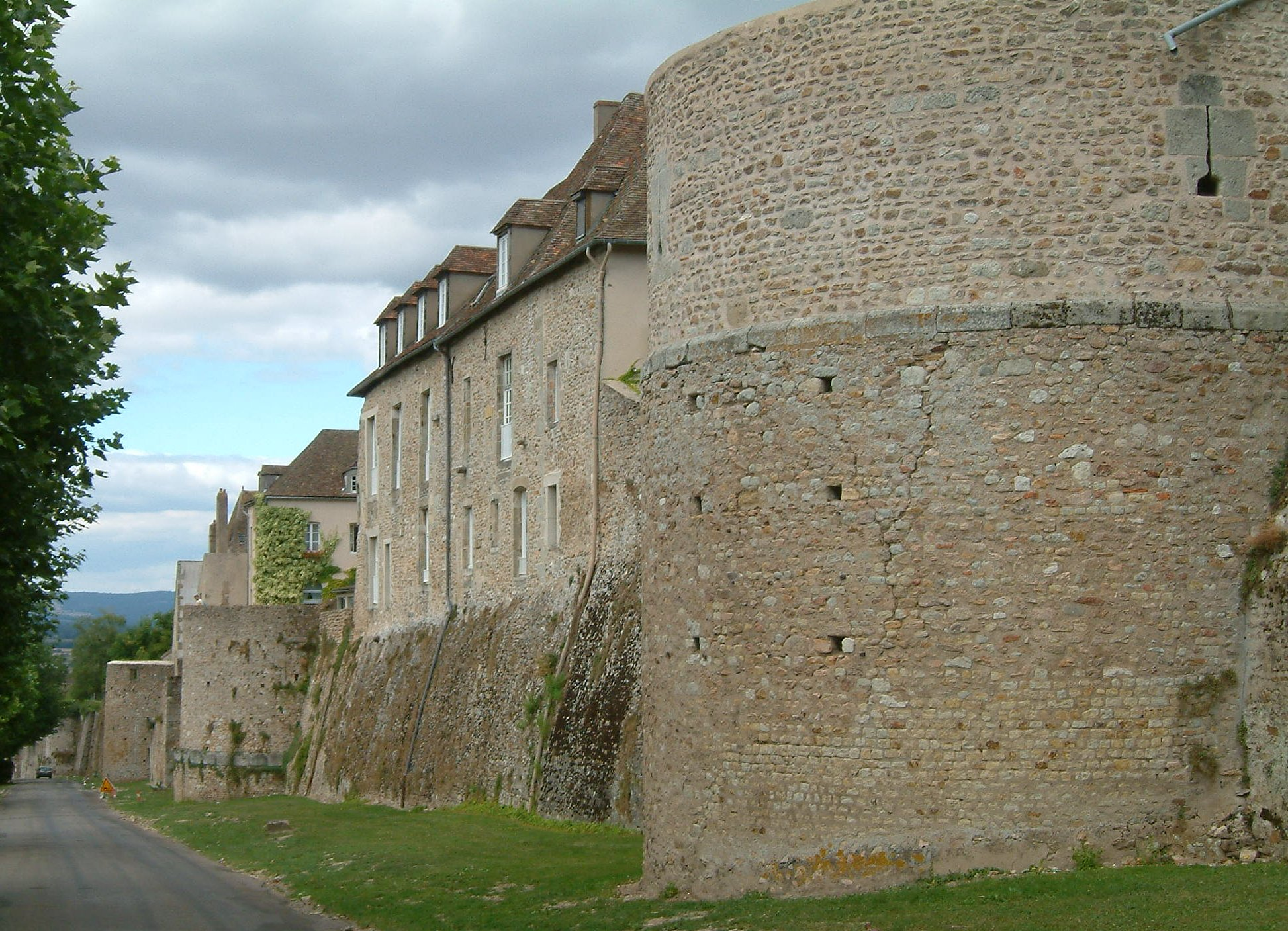 Remparts gallo-romain, Autun, Bourgogne, FRANCE